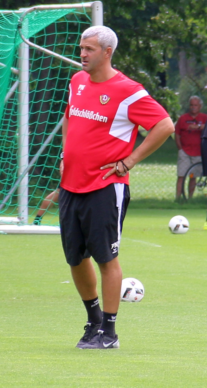 Peter Németh (SG Dynamo Dresden)